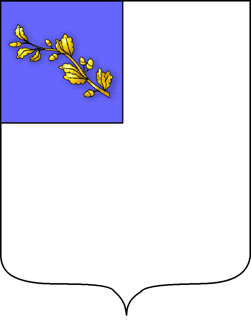 blason de comte, membre de la collegion electoral